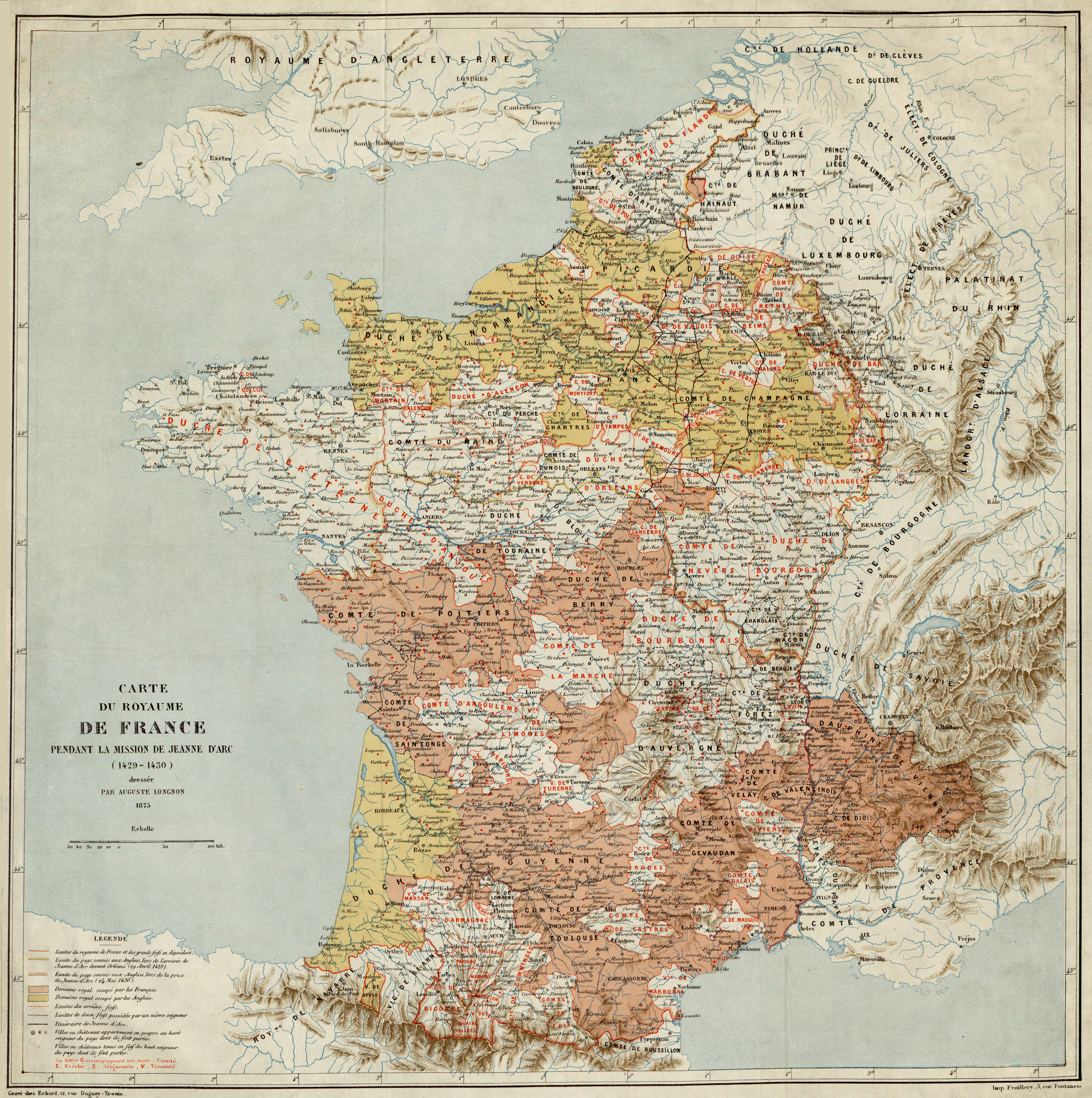 Carte du royaume de France pendant la mission de Jeanne d'Arc 1429-1430. Carte dressée par l'archiviste et historien Auguste Longnon.